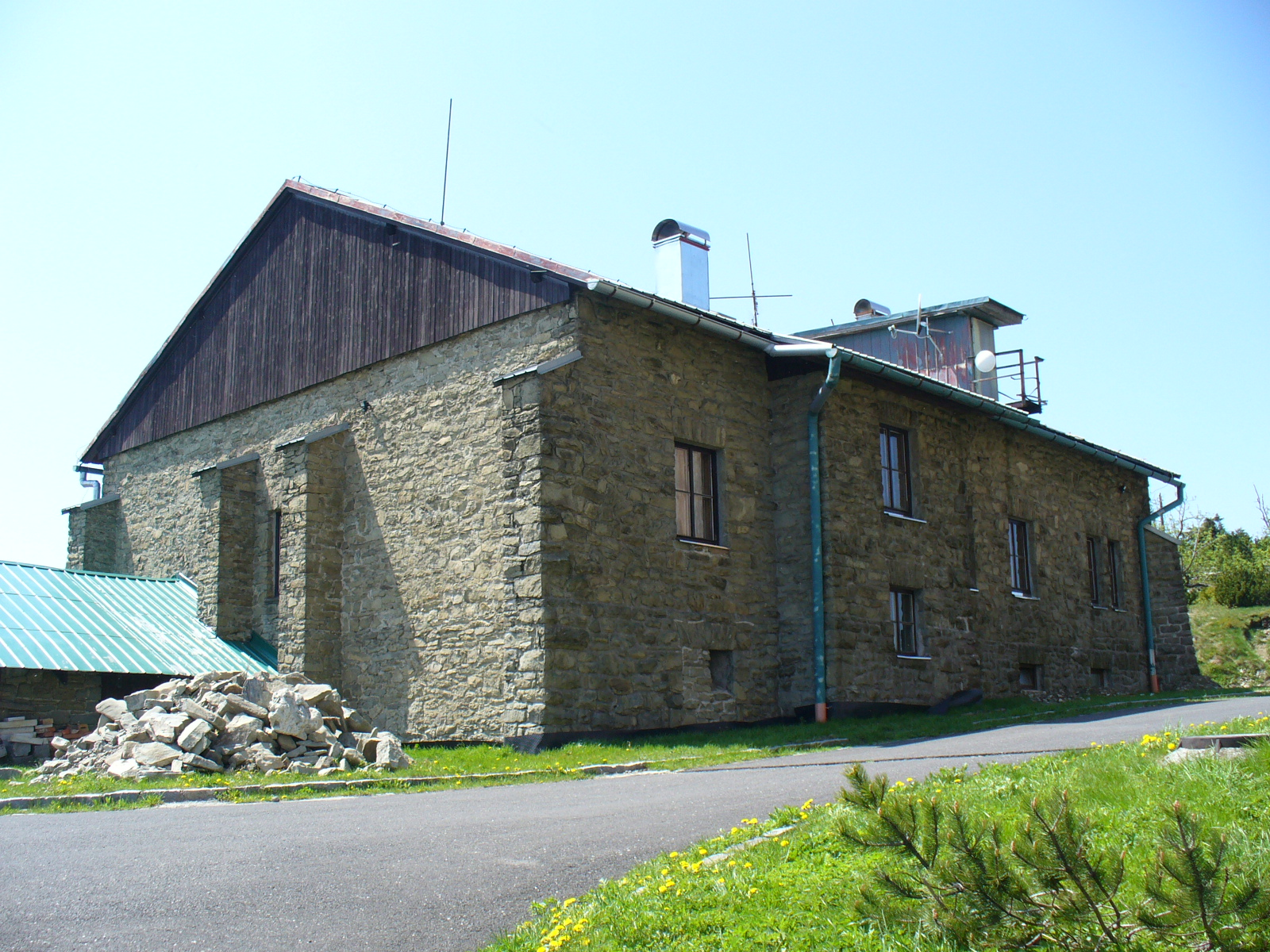 Steinerne Haus na Łysej Górze (Beskid Śląsko-Morawski)